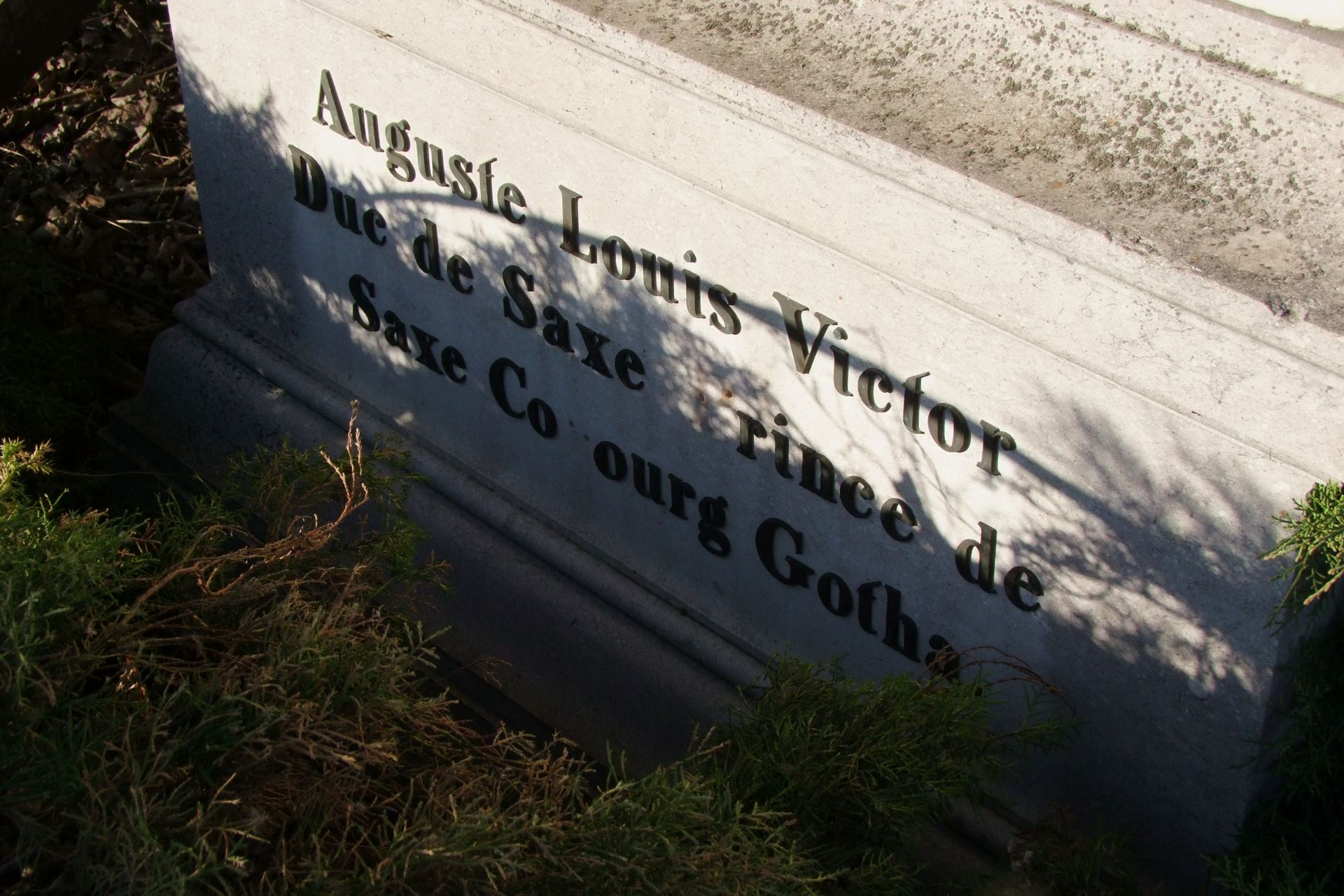 Grabdenkmal für August Ludwig Viktor von Sachsen-Coburg-Gotha